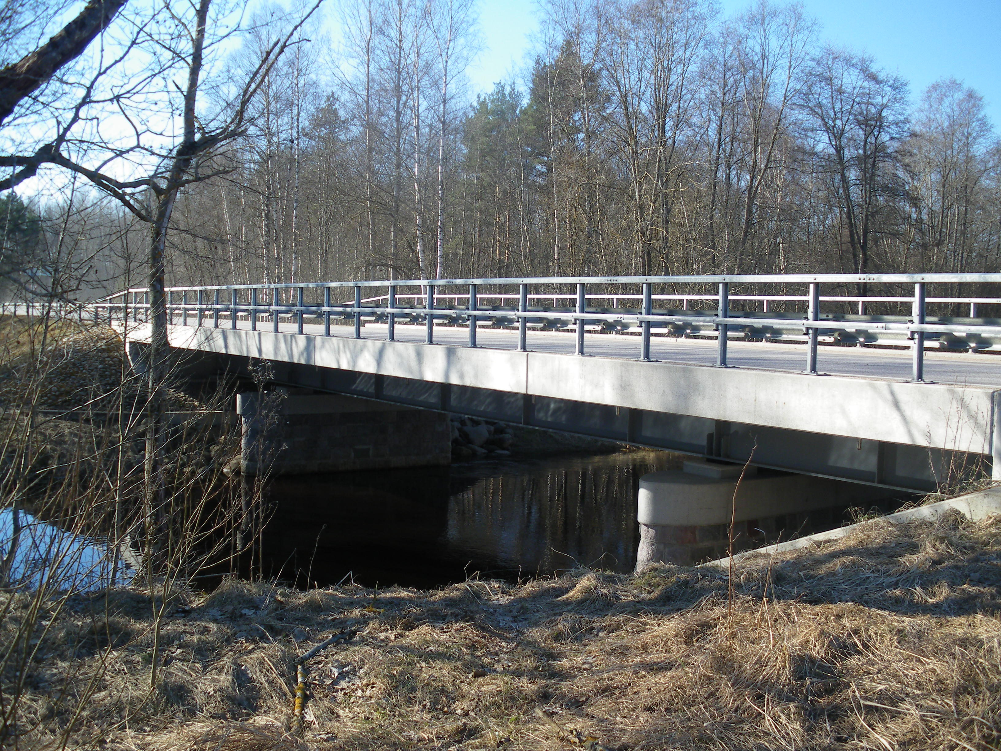 Soodla sild pärast renoveerimist (2010).